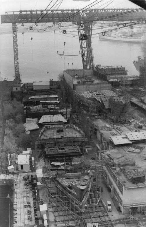 Wismar, Mathias-Thesen-Werft, Trockendock, Helling "ADN-ZB Sindermann 25.11.82 Bez.Rostock: Das zweite Kühl- und Transportschiff vom Typ "Kristall II" entsteht gegenwärtig auf der Helling der Mathias-Thesen-Werft in Wismar. Zu den Vorzügen des 153 Meter langen Schiffes, das für die Sowjetunion bestimmt ist, zählt die um 1150 Tonnen höhere Tragfähigkeit bei gleichbleibender Schiffsmasse.